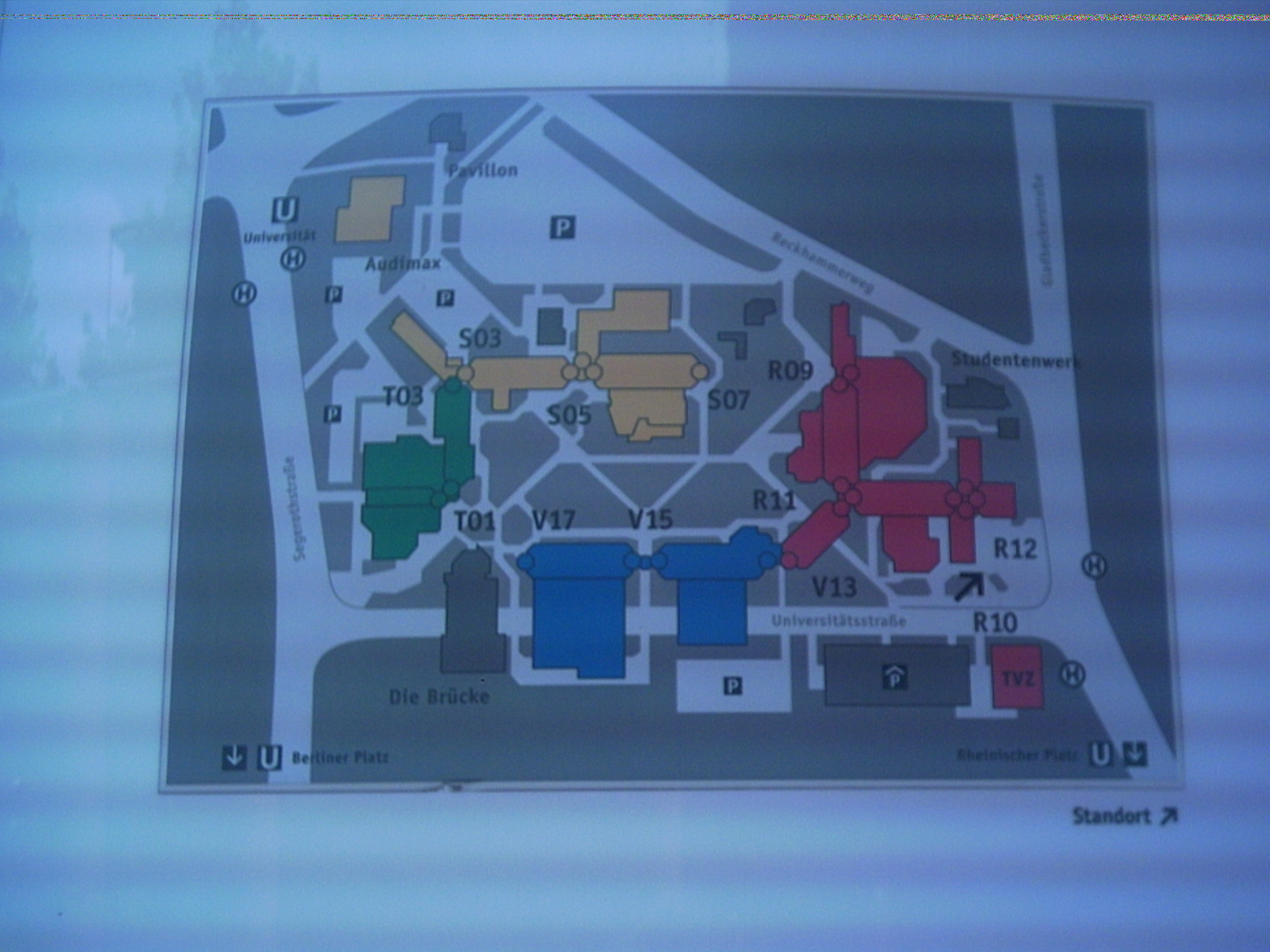 Universität Duisburg-Essen, Standort Essen